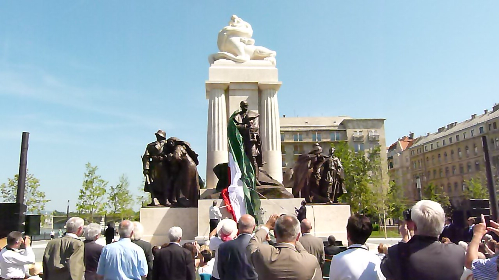 A felvételek 2014. június 9 –én, Pünkösd hétfőn készültek Budapesten, a Kossuth téren. Gróf Tisza István szobrának újraavatása. Beszédet mondott Orbán Viktor. A szoborcsoportot újraalkotta Elek István szobrász. A szoborcsoportot Zala György és Orbán Antal tervei alapján 1934. április 22-én (Tisza István születésnapján) állítottak fel. 17 méter magas volt, talapzata süttői mészkőből készült. Az oroszlánt 36 köbméter kőből faragták ki, és 12 darabból állították össze. A második világháború folyamán megsérült, majd 1945 tavaszán ismeretlenek lerombolták. A szobor főalakját, a 18 mázsányi töredéket később beolvasztották. Az emlékmű meg nem semmisített darabjai közül a földművelőket ábrázoló szoborcsoport Esztergomba került, A katona búcsúja című mellékcsoportot a Hűvösvölgyi úti laktanya udvarára, majd a keceli Pintér Művek haditechnikai gyűjteményébe vitték, a posztamens tetejét díszítő kőoroszlánt pedig 1948-ban a Hegyalja út végében, a hajdani tabáni temető helyén állították fel, majd a hatvanas években nyersanyagként fiatal művészeknek osztották ki. Így került az oroszlán feje egy fiatal szobrászművészhez, aki érintetlenül megőrizte, és ma is szentendrei háza kertjében tartja. Cimkék: Gróf Tisza István Budapest Kossuth tér Orbán Viktor Zala György Orbán Antal 2014 Steindl Imre Program Elek István szobrász Szvorák Katalin népdalénekes Források: Orbán: Van, akit nem elég egyszer megölni